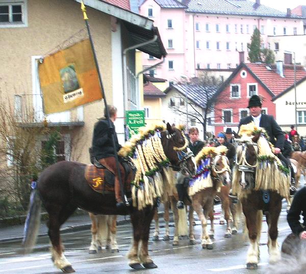 Georgiritt in Traunstein Selbst fotografiert. Bild gemeinfrei.